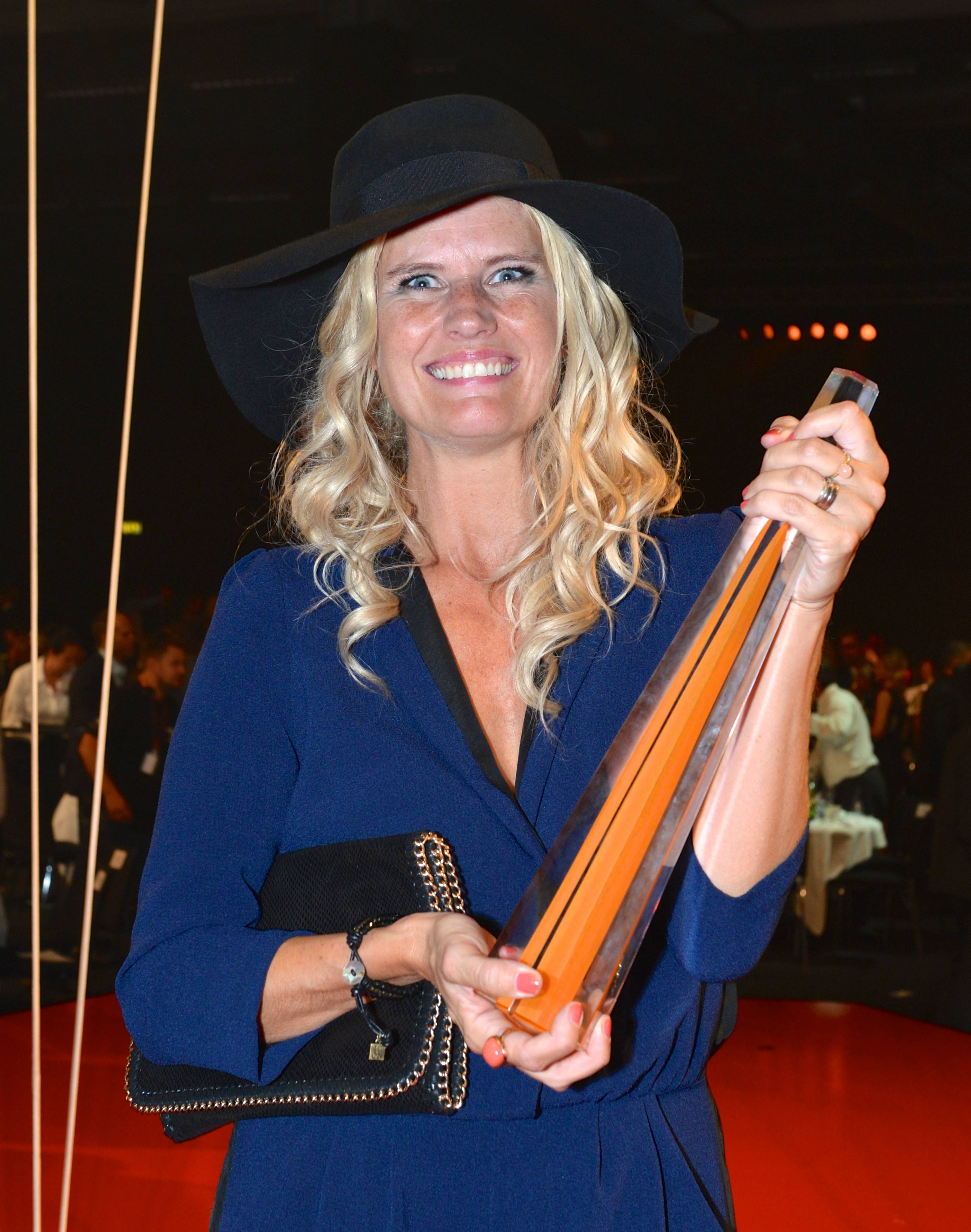 Årets humorprogram på Kristallengalan den 30 augusti 2013 gick till Partaj (Kanal 5). Christine Meltzer var en av deltagarna.